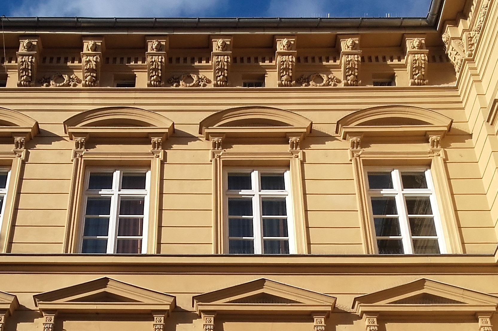 Ansicht Fassade St.-Anna-Grundschule Augsburg